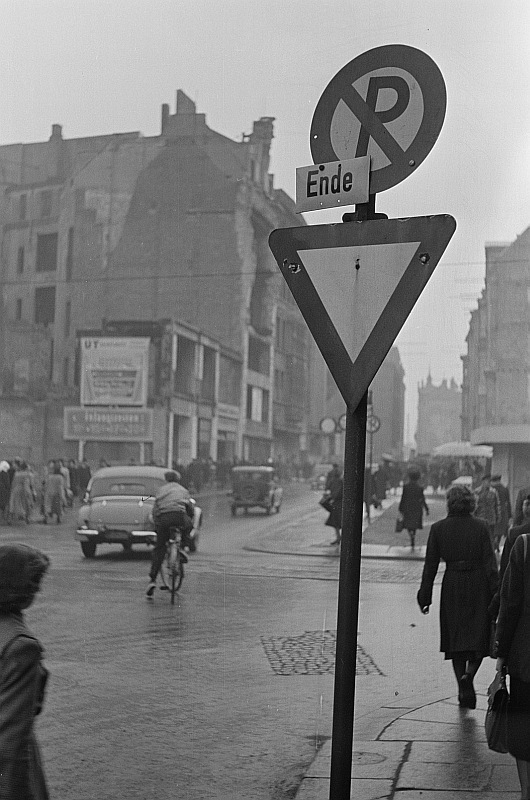 Original image description from the Deutsche Fotothek Verkehrszeichen in der Innenstadt